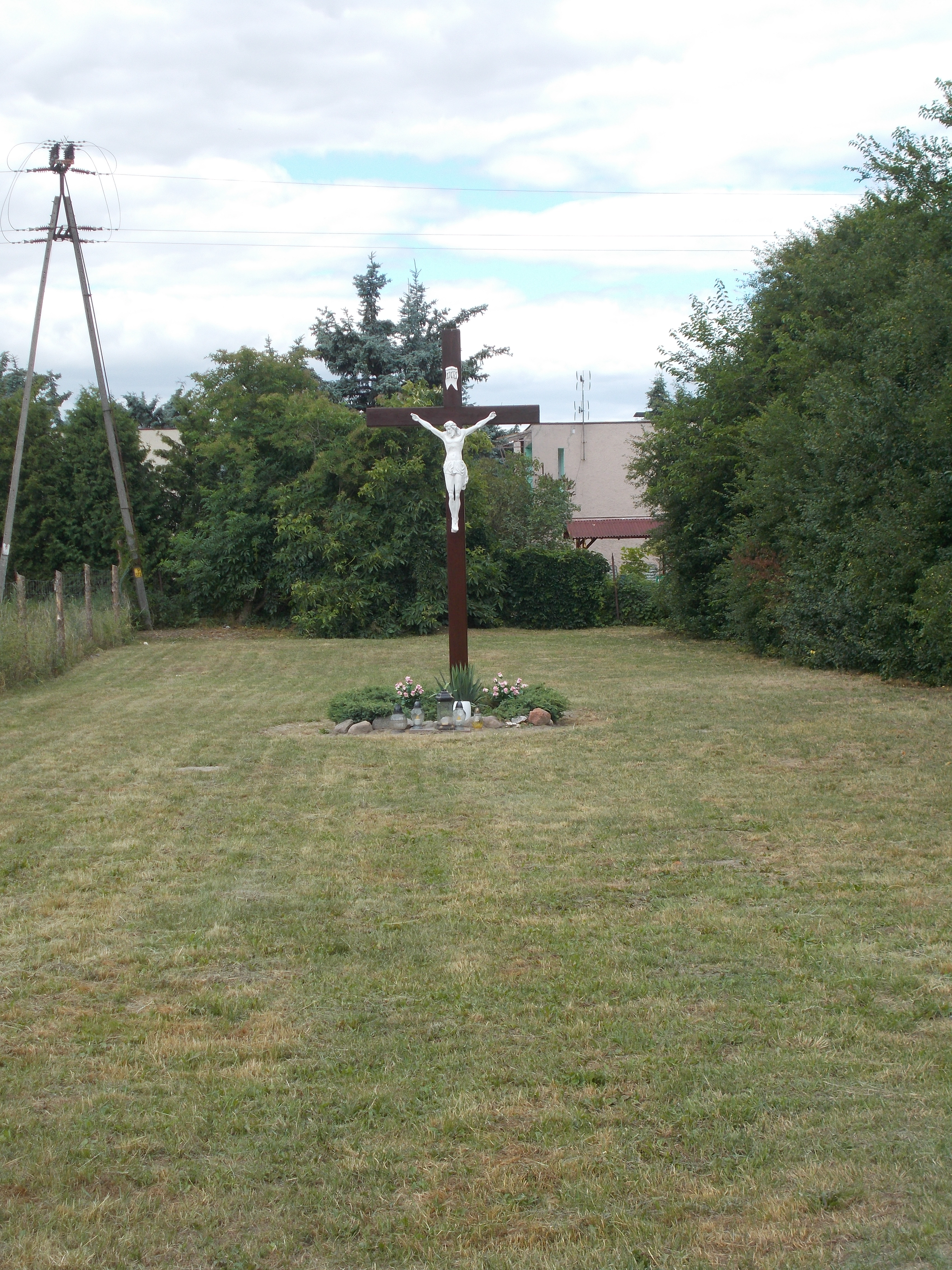 Krzyż na terenie parafii pw. św. Moniki w Poznaniu.